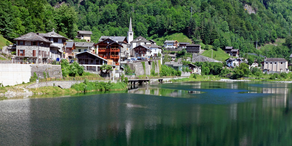 Panorama di Rimasco